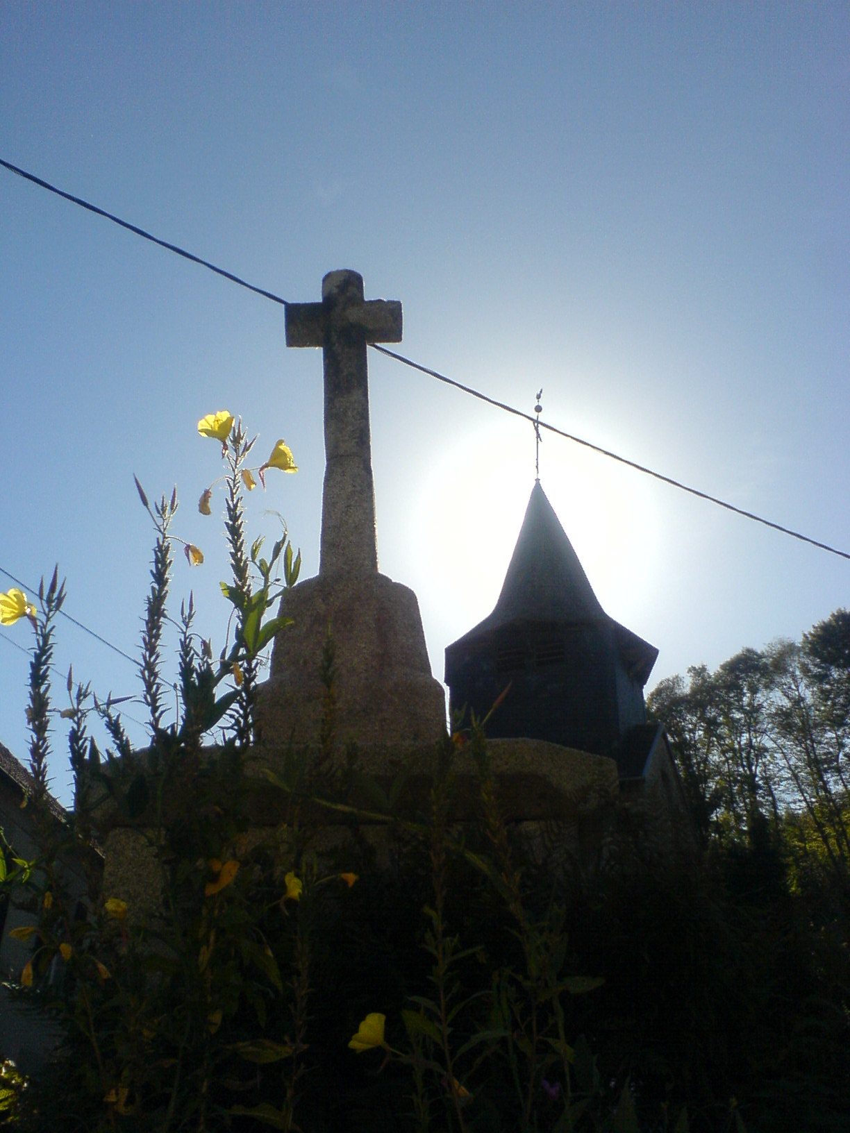 vue soleil église